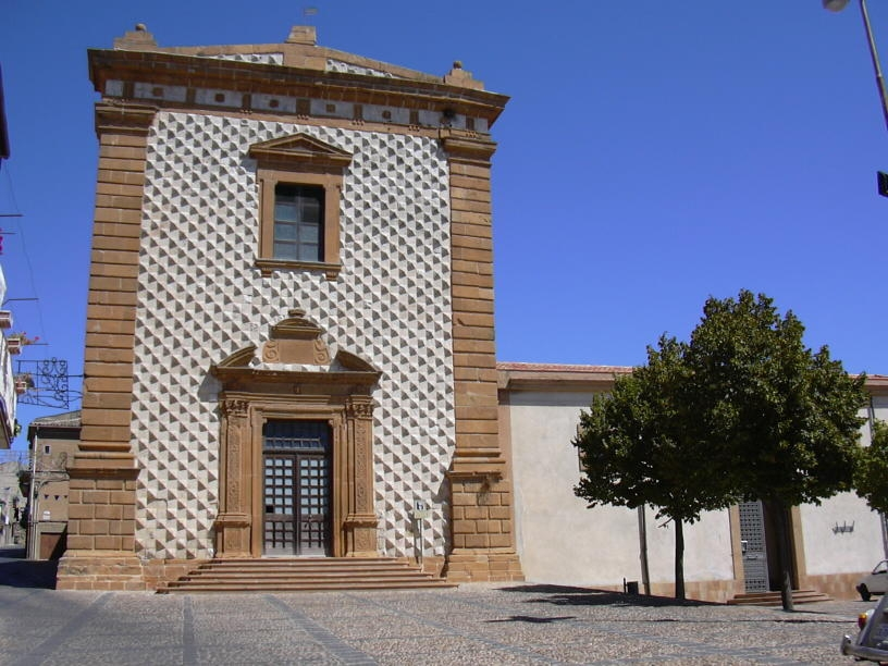 Aidone - EN_Sicilia:ex Chiesa di San Domenico, la facciata in bugnato a punta di diamante è del XV sec.; i cantonali e il portale baroccheggianti, in pietra arenaria, sono del XVII sec,successivi al terremoto del 1693.